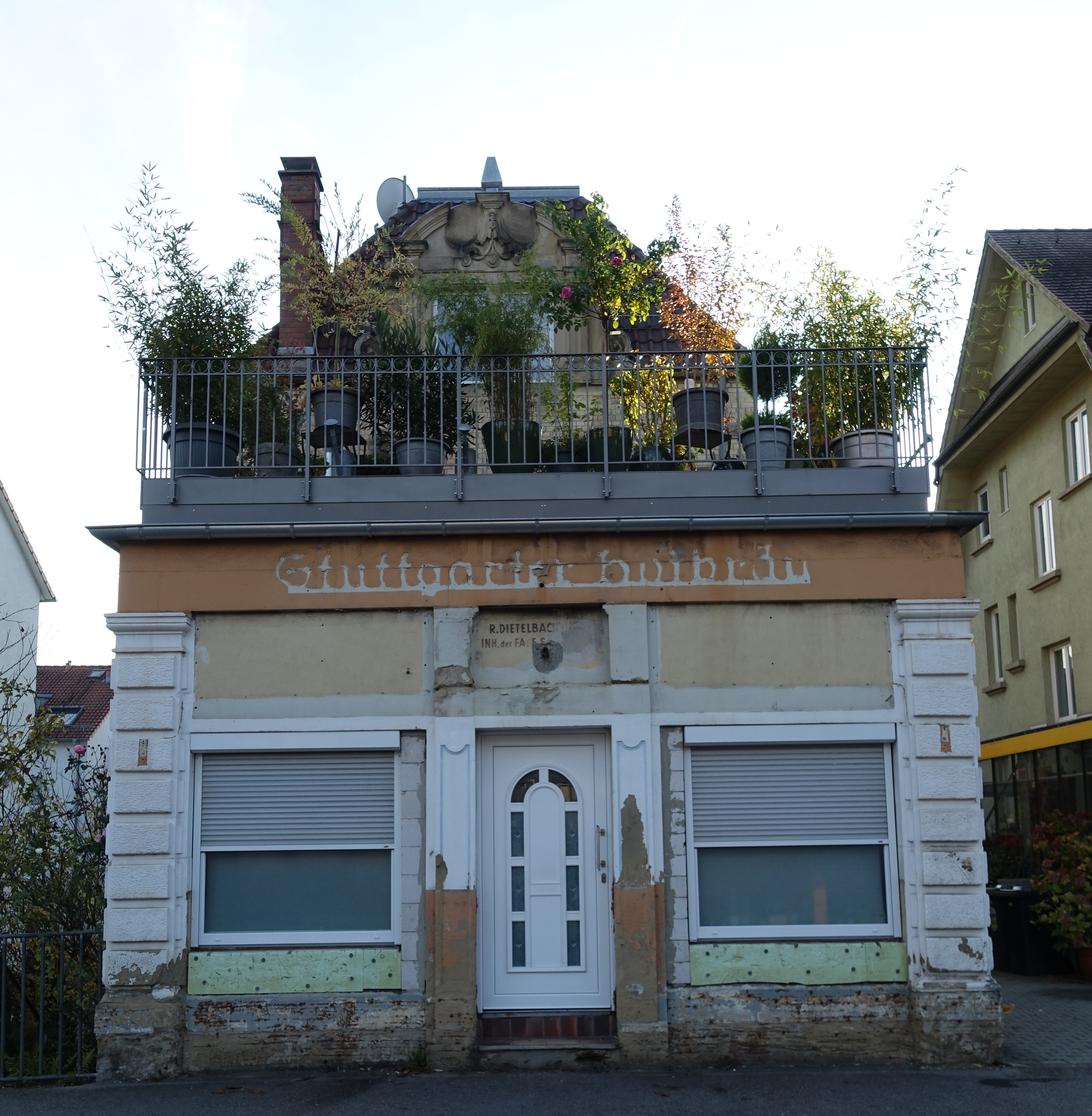 Friedhofstraße 43 in Stuttgart. Früher Atelier des Bildhauers Rudolf Dietelbach, Inhaber der Firma Ernst Schönleber, später Gaststätte („Stuttgarter Hofbräu“).